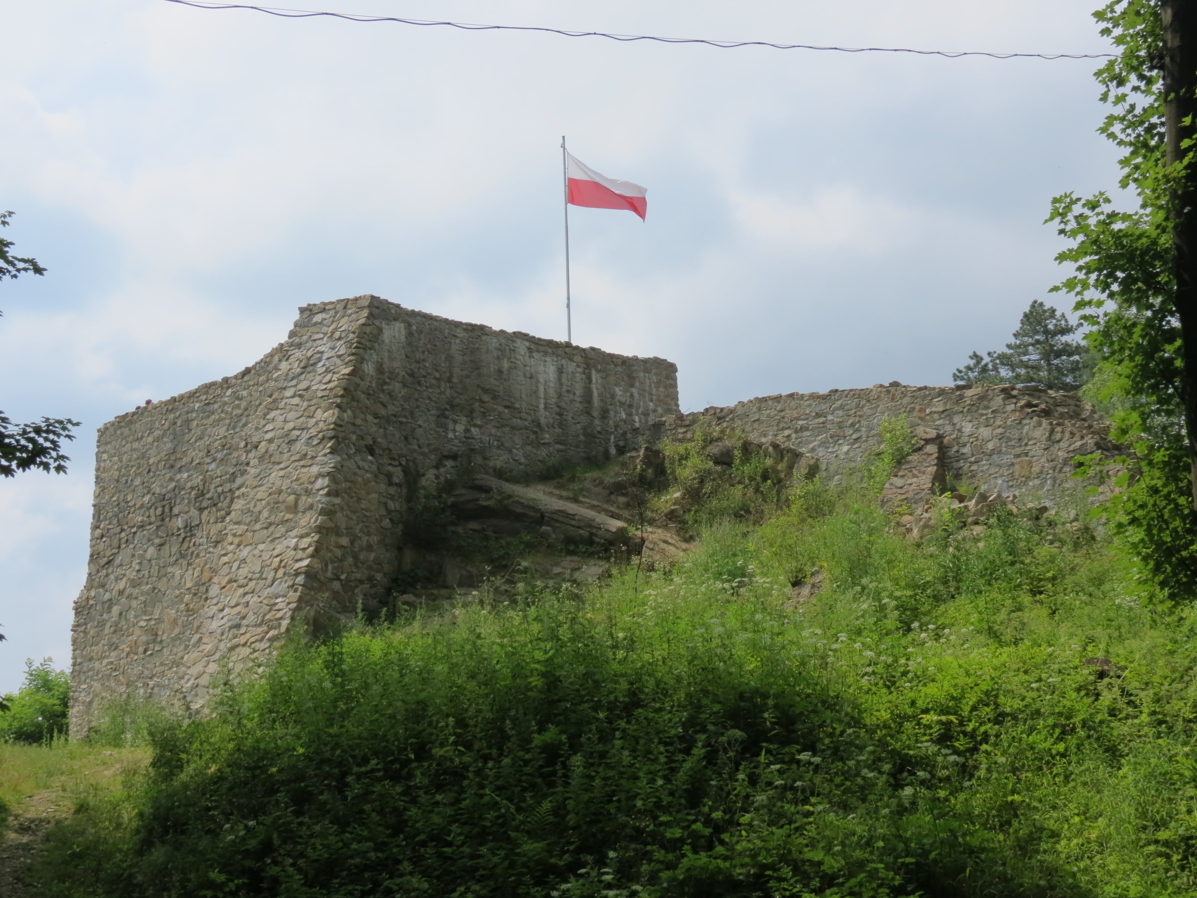 Muszyna, ruiny zamku, XIV, XVI